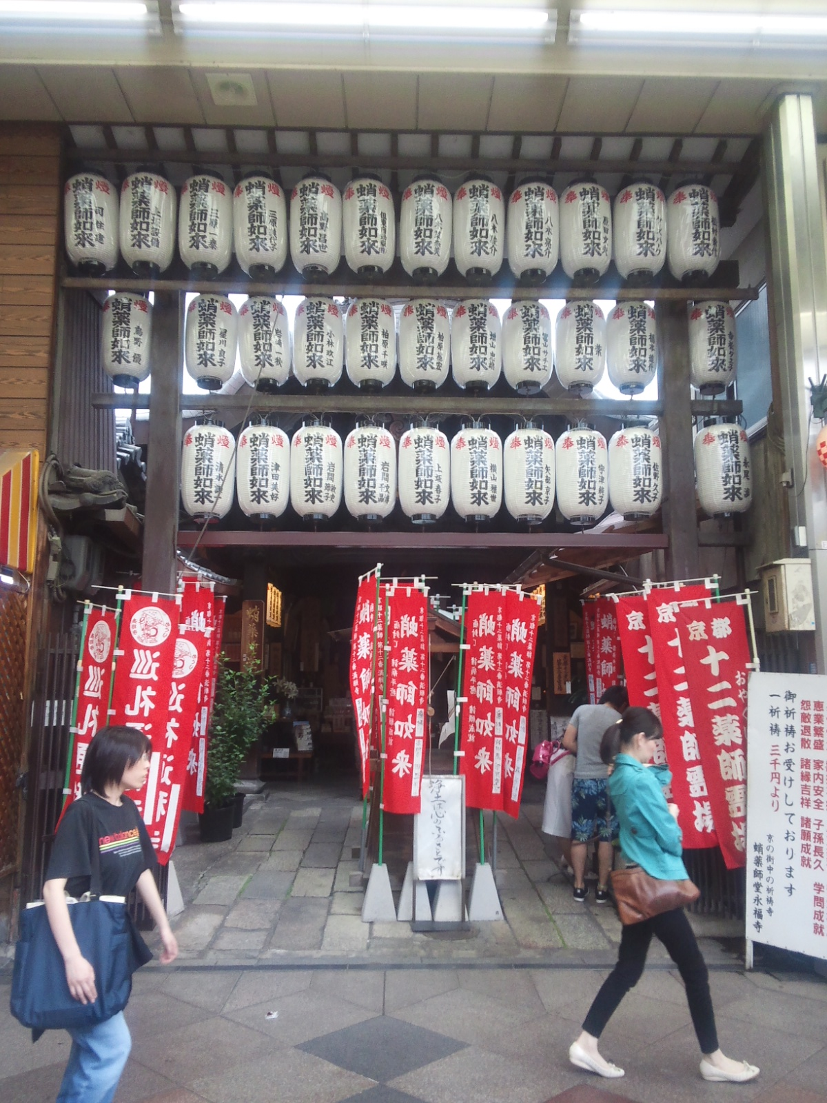 蛸薬師堂永福寺 - 入口